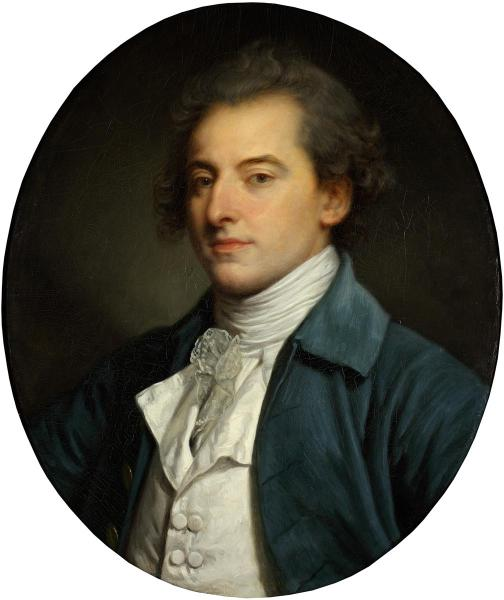 Граф Андрей Петрович Шувалов